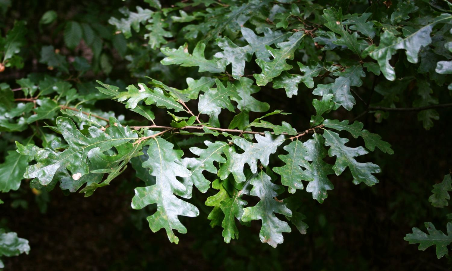 Zerr-Eiche (Quercus cerris), Buchengewächse (Fagaceae) - Österreich/Austria/Autriche: Niederösterreich, Weinviertel, „Steinbergwald“ zwischen Zistersdorf und Neusiedl an der Zaya